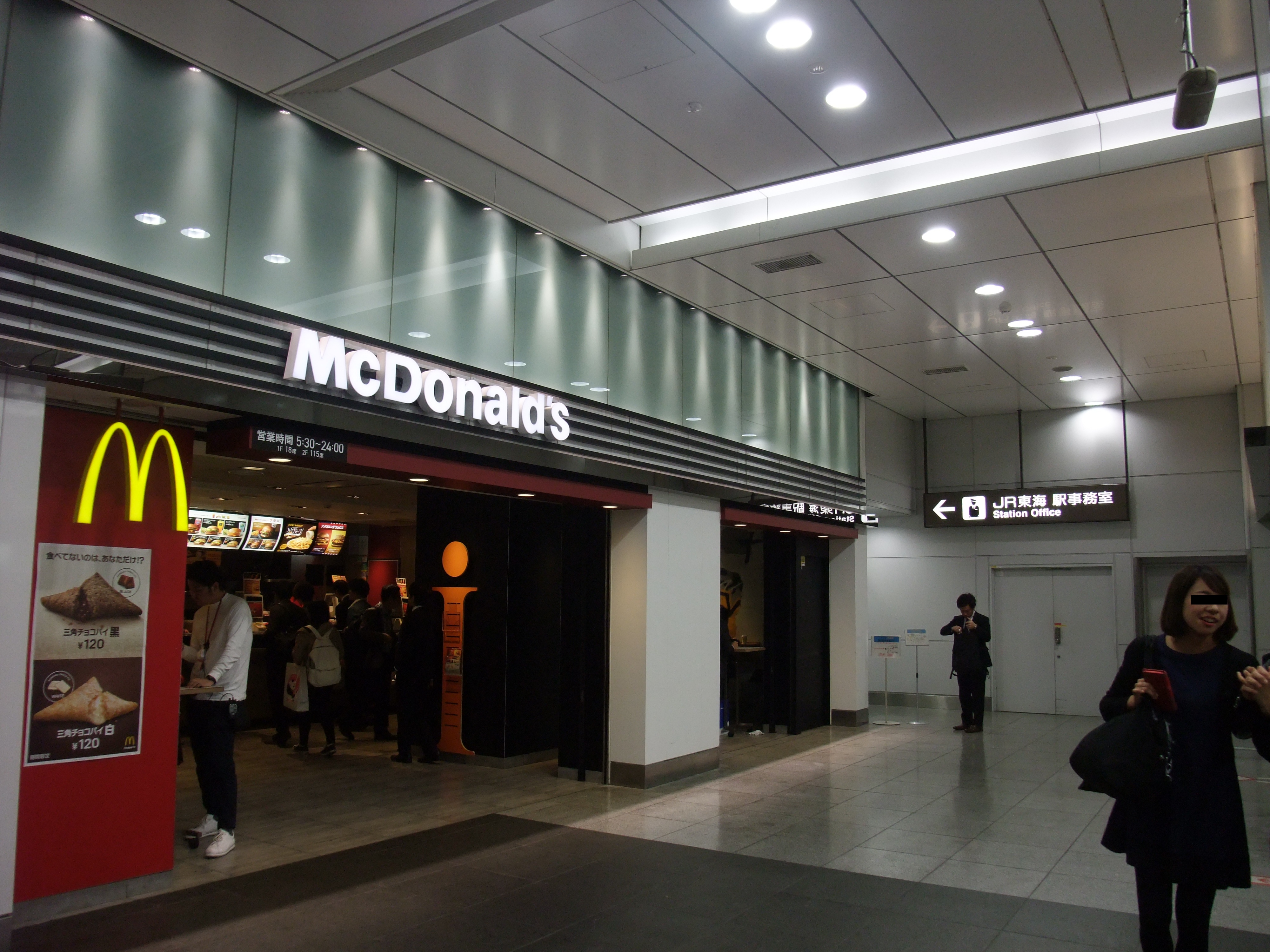 JR東日本の牙城である東京駅の八重洲南口南端（東海道新幹線高架下）にあるJR東海・東海道新幹線の駅事務所。駅構内エリアとしてはJR東海系列の東京ステーション開発による東京駅一番街内になり、ここのマクドナルドは一番街フロアマップによると利用者数日本一の店舗になる。